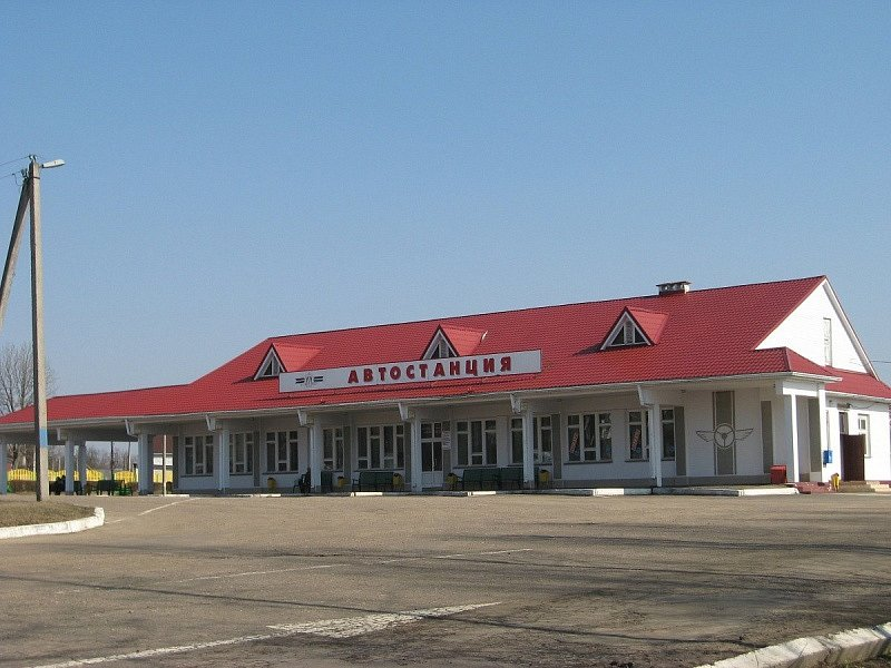 Дзяржынск. Аўтастанцыя